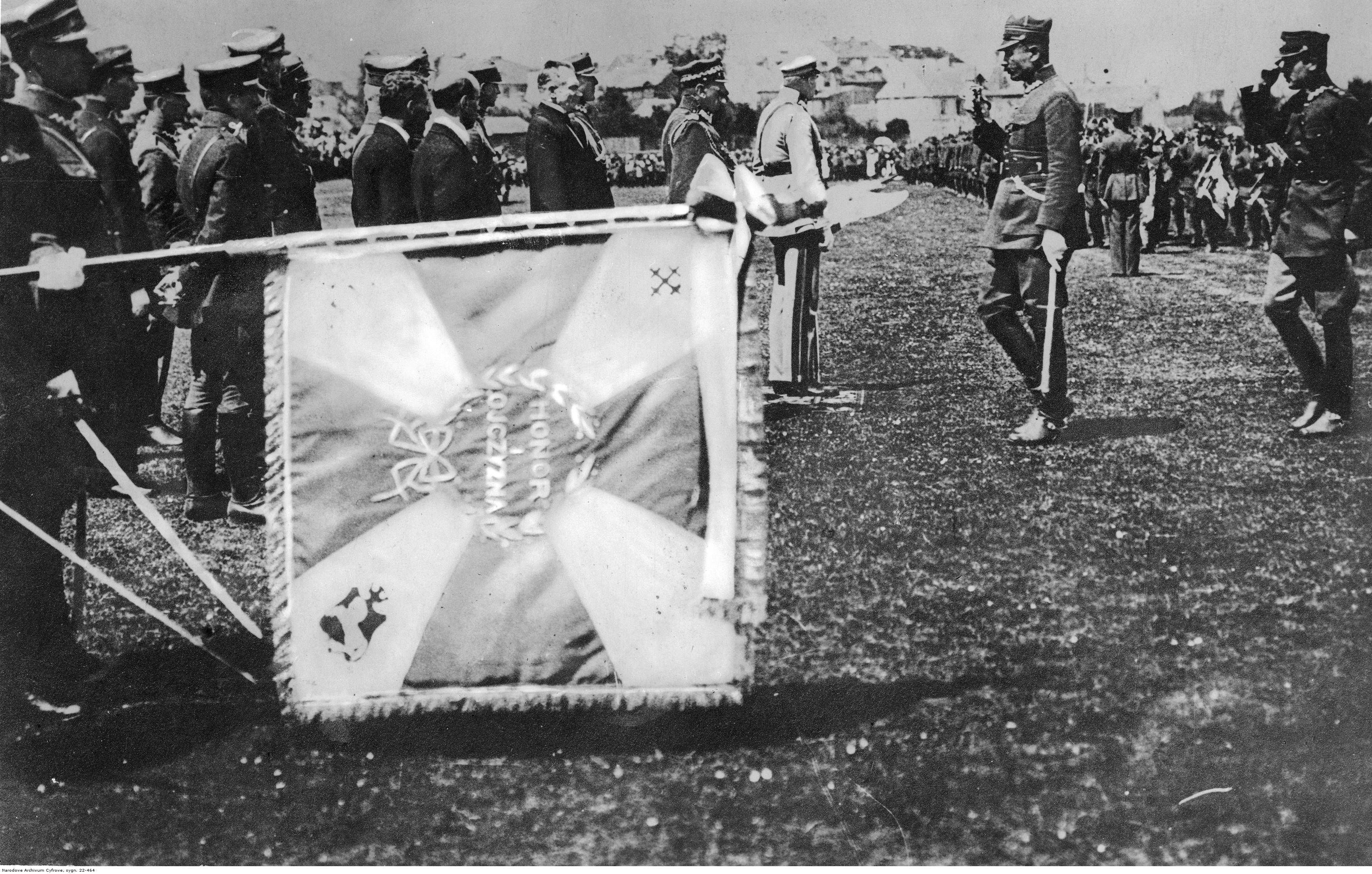 Fragment uroczystoći z udziałem Marszałka Józefa Piłsudskiego. Na pierwszym planie widoczny sztandar nierozpoznanego pułku piechoty.